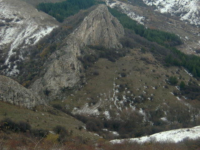 с. Гургулят, местност - Пеклюк